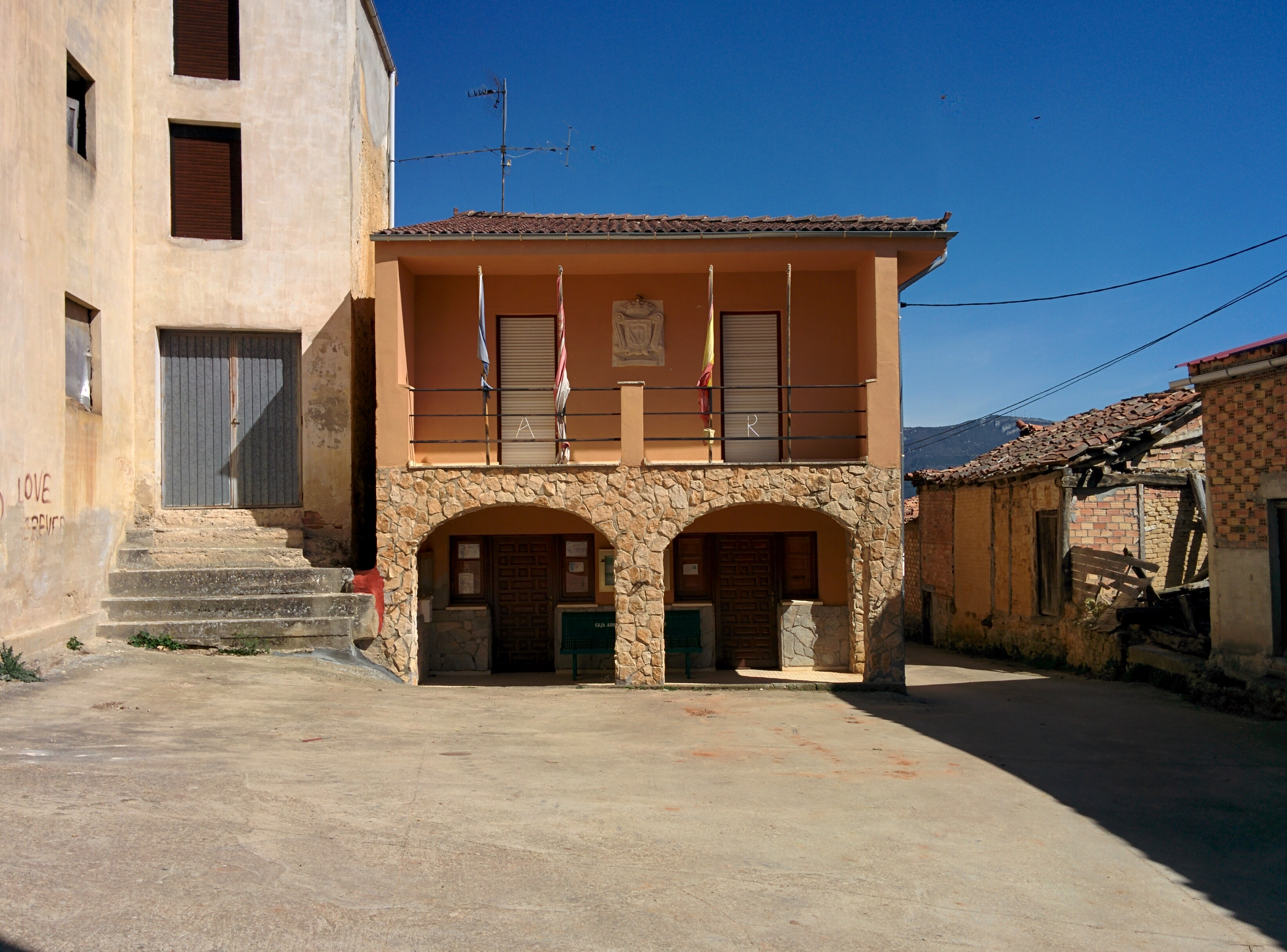 Casa consistorial de Rucandio (Burgos, España).